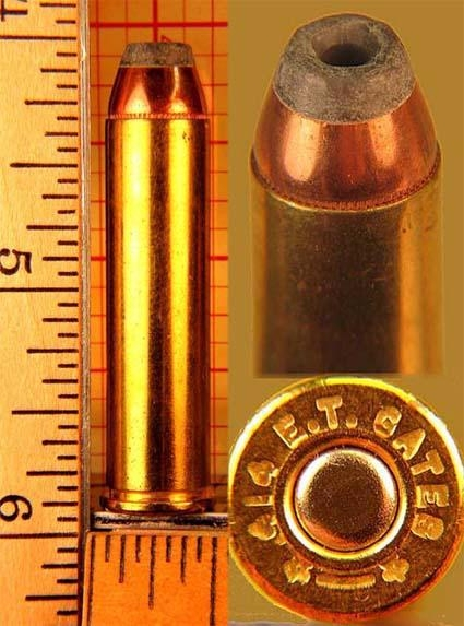 Photo par mes soins Licensing Catégorie:Munition